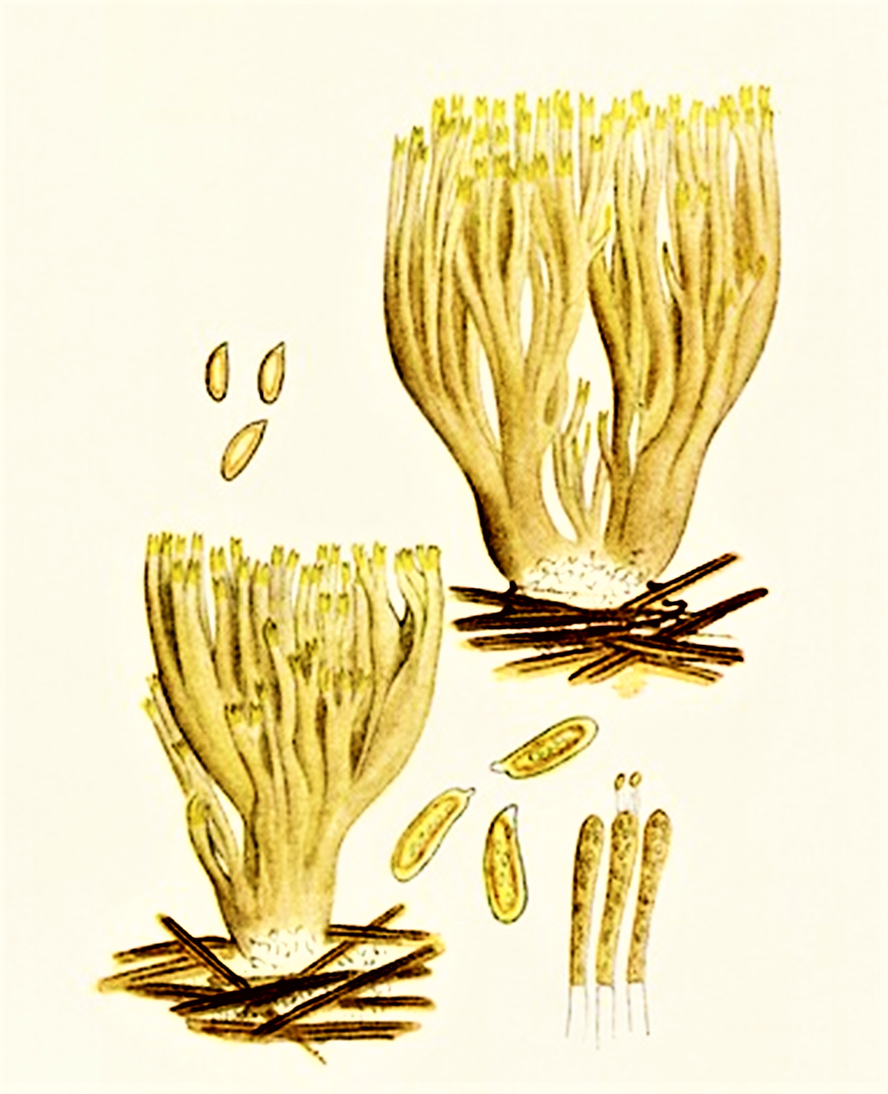 Giacomo Bresadola: Clavaria condensata Fr., 1838), heute: Ramaria stricta ((Pers., 1795) Quél. (1888)